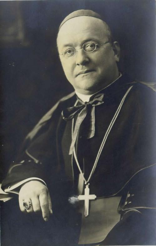 Andrej Karlin (* 15. November 1857 in Stara Loka bei Škofja Loka; † 6. März 1933 in Marburg) war Bischof von Triest und Lavant.